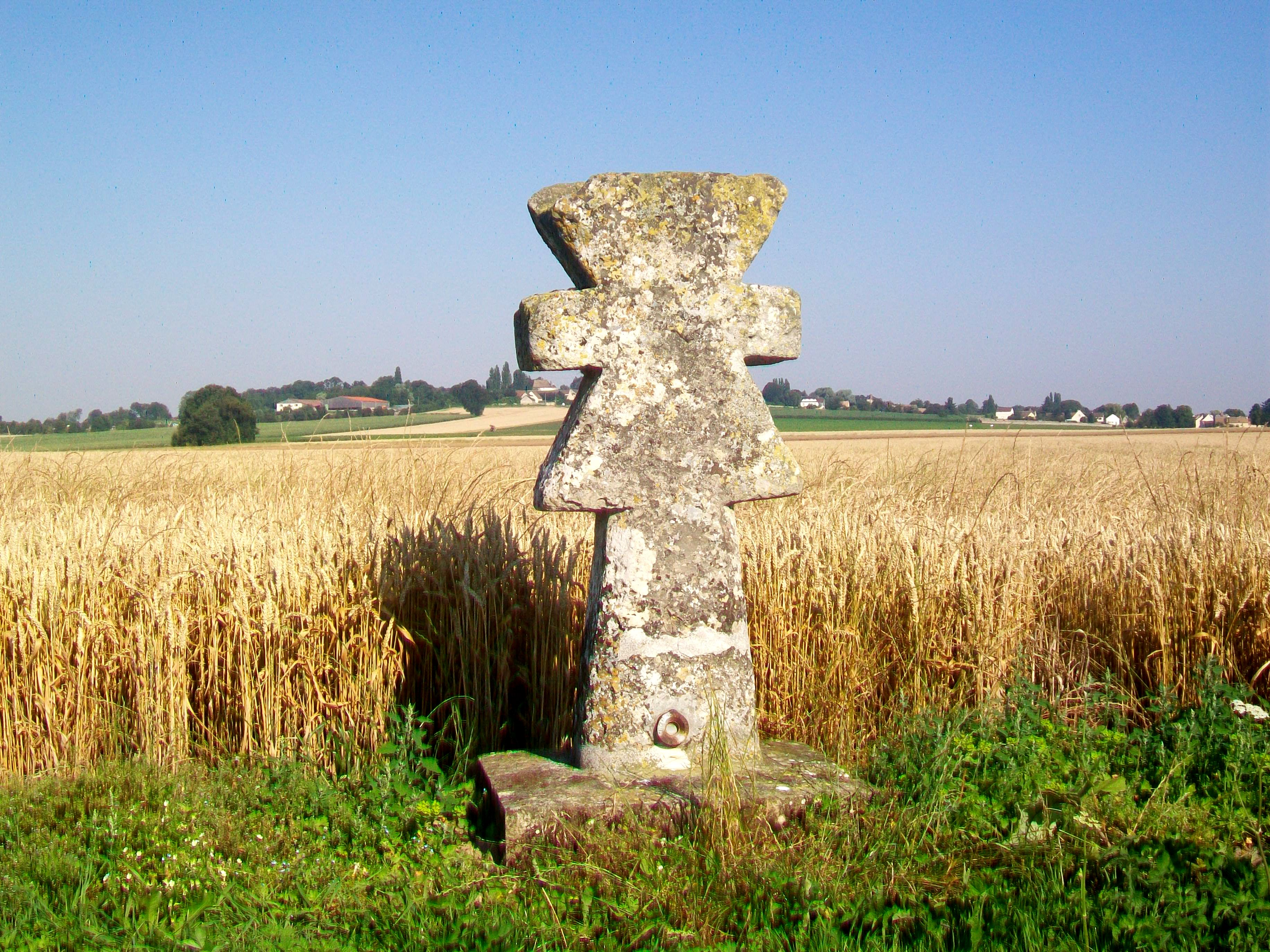 La croix pattée de Guiry-en-Vexin, en pleins champs ; au fond, le village de Cléry-en-Vexin.